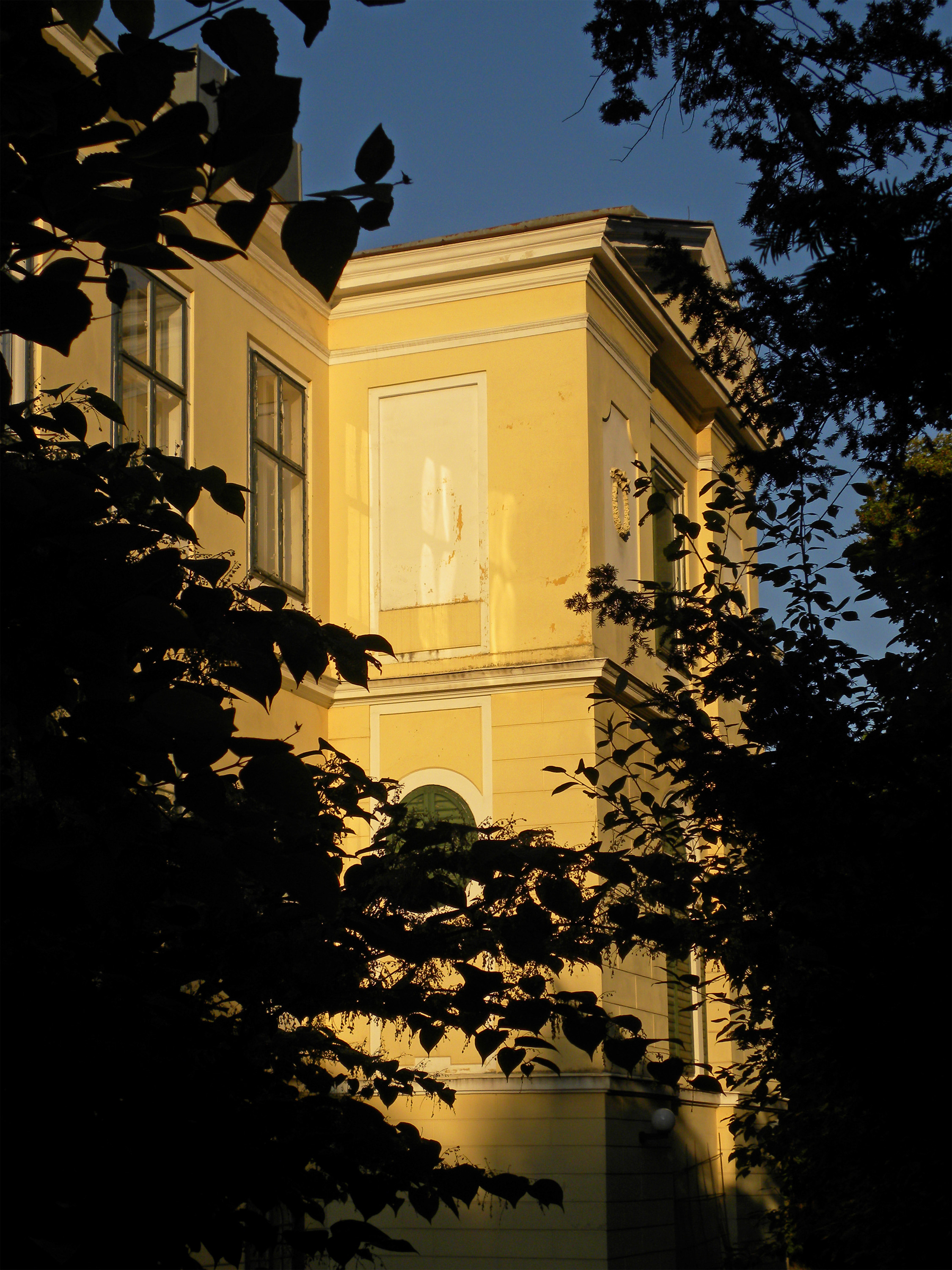 Villa Windischgrätz